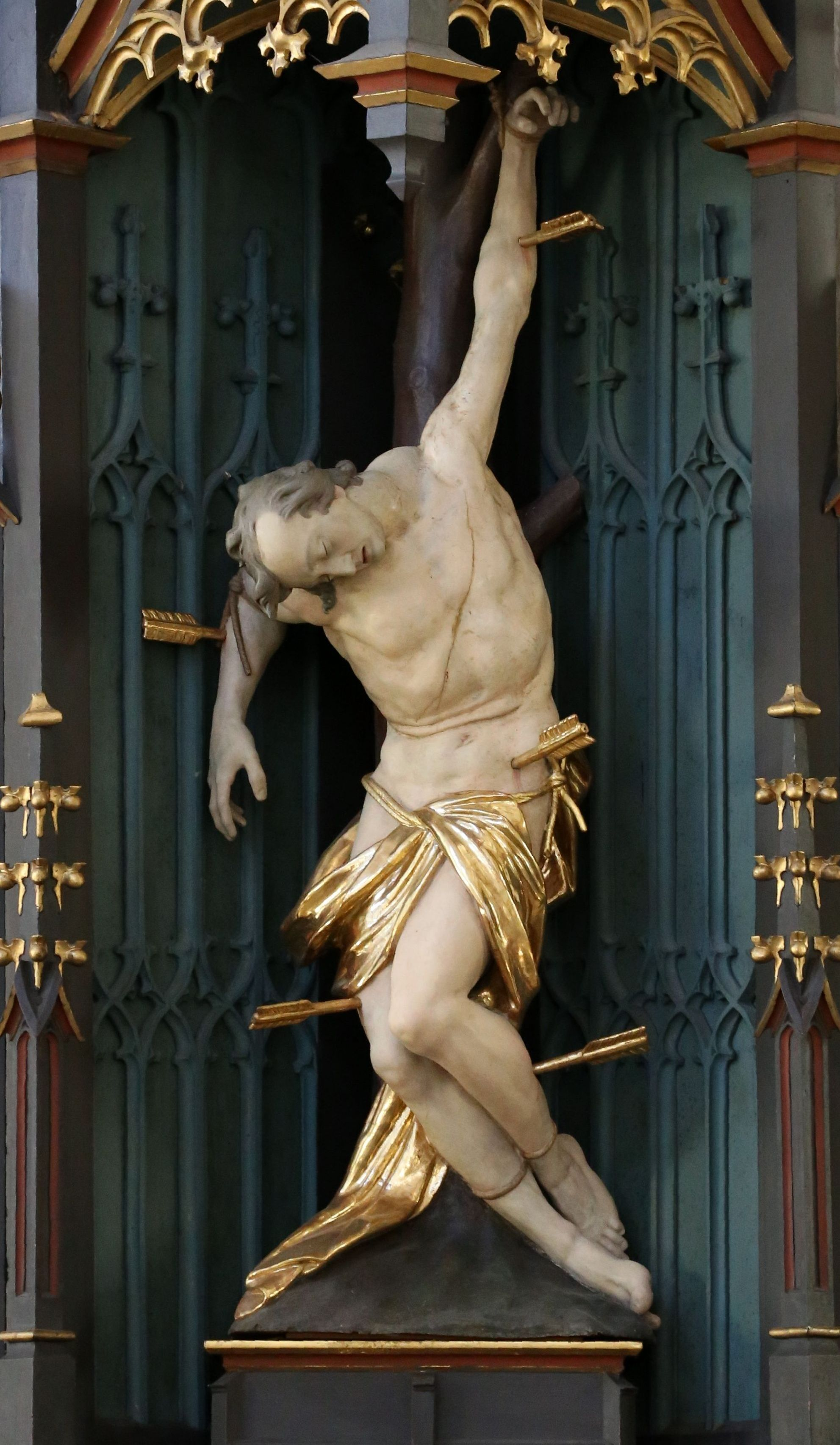 Messerzeile 19, Burghausen; Katholische Stadtpfarrkirche St. Jakob; unverputzter Tuffquaderbau mit Westturm, das Turmobergeschoss mit vielfach gegliederter barocker Kuppel, dreischiffige querschifflose Basilika, nach 1353, Grundsteinlegung zum Turm 1470, nach Einsturz des südlichen Teils des Kirchenschiffs Neubau 1851 durch Franz Joseph von Denzinger, Restaurierung 1969/70